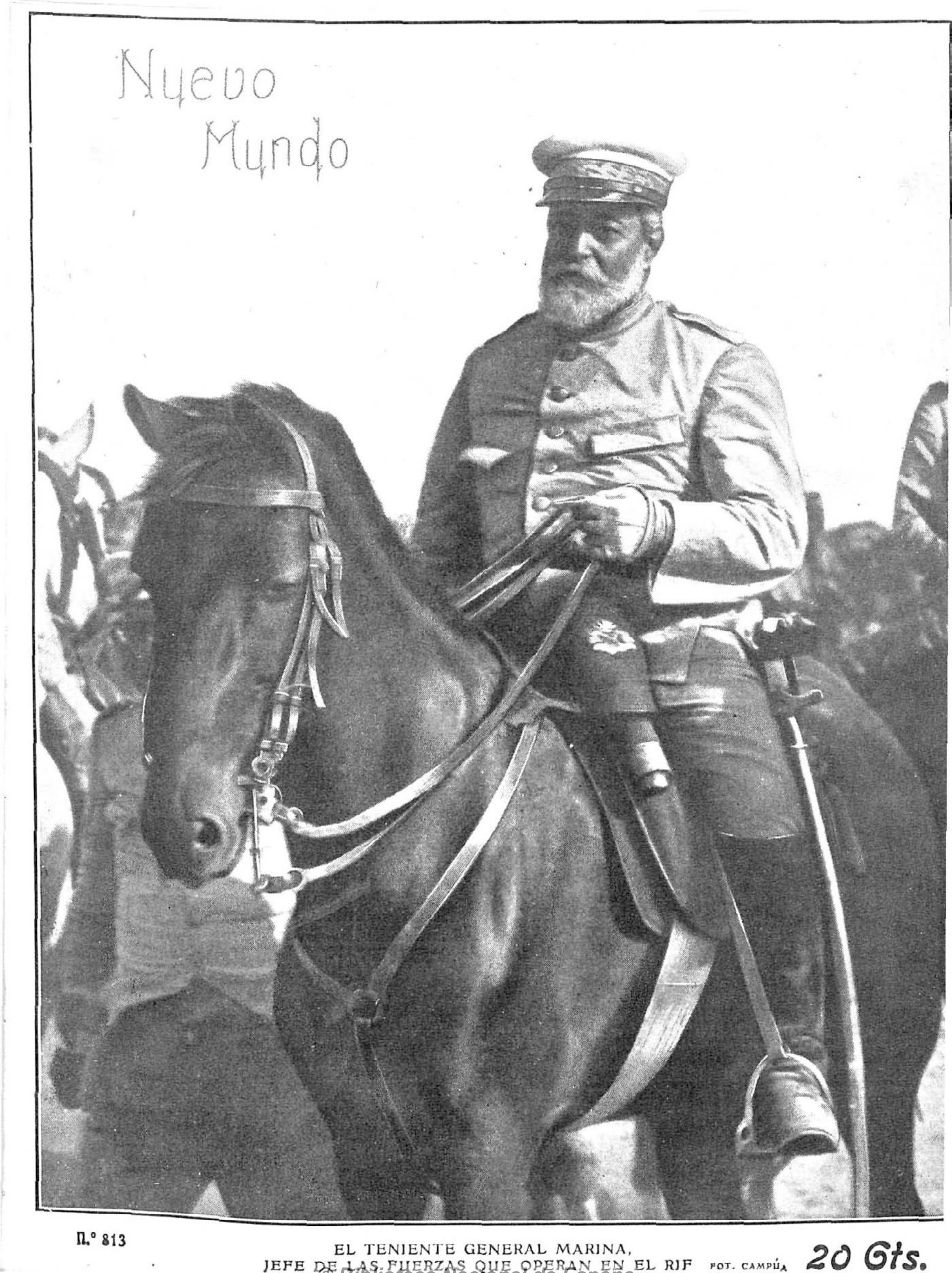 El teniente general Marina, jefe de las fuerzas que operan en el Rif.